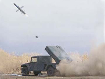 略称：MPMS 愛称：96マルチ [構成] ・情報処理装置:射撃指揮装置 ・地上誘導装置:発射機 [製作]川崎重工 多目的誘導弾システムは、戦車等を遠距離から撃破するシステムである。